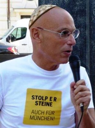 Terry Swartzberg